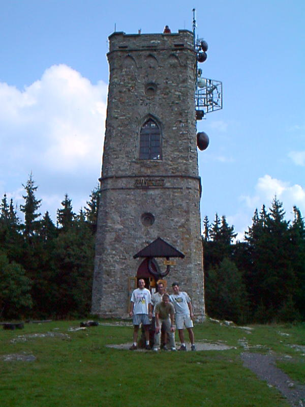 Rozhledna na Žalý je častým cílem procházek po Benecku.